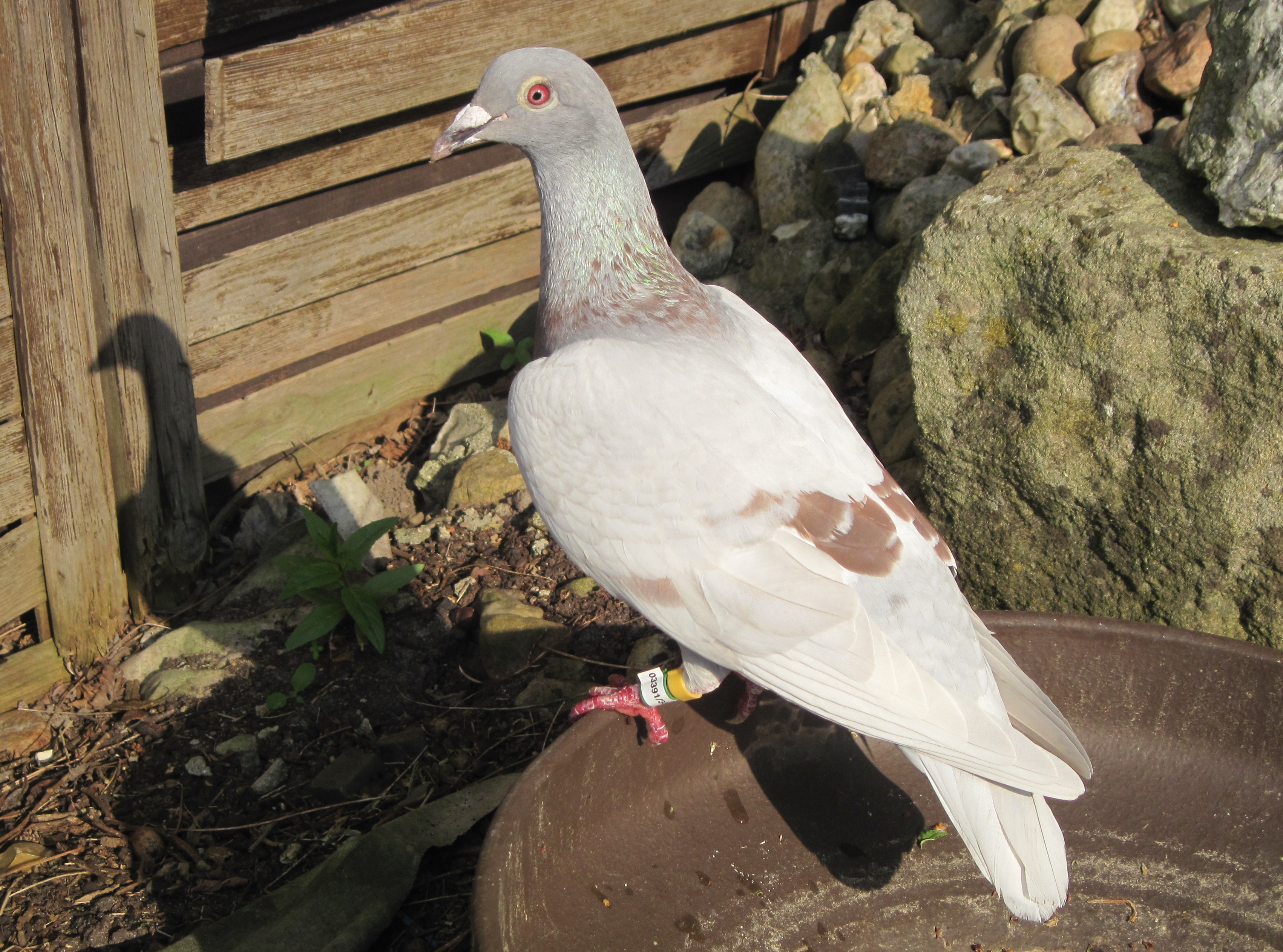 Verirrte Brieftaube im Schrebergarten gelandet